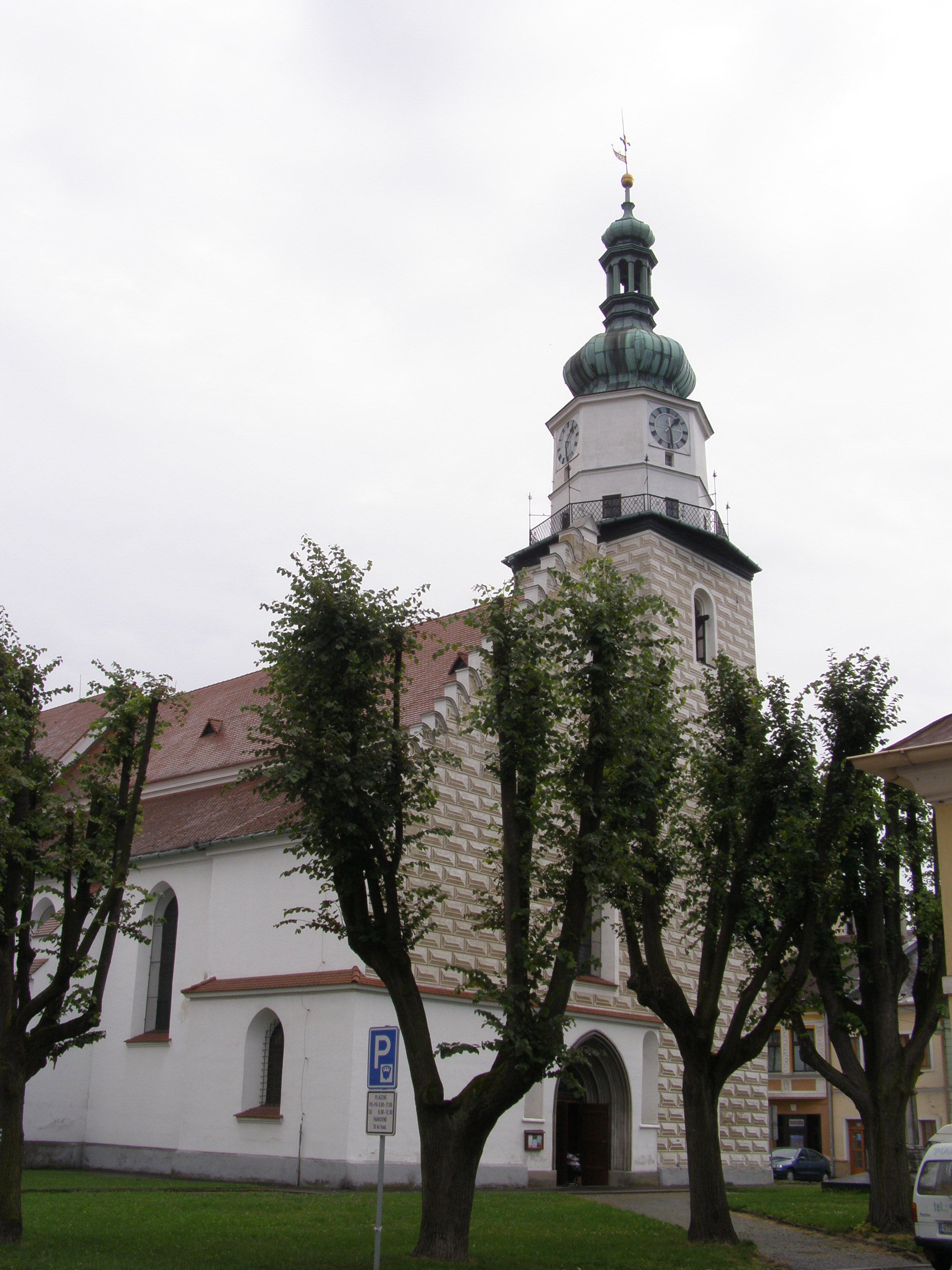 Bruntál, kostel Nanebevzetí Panny Marie